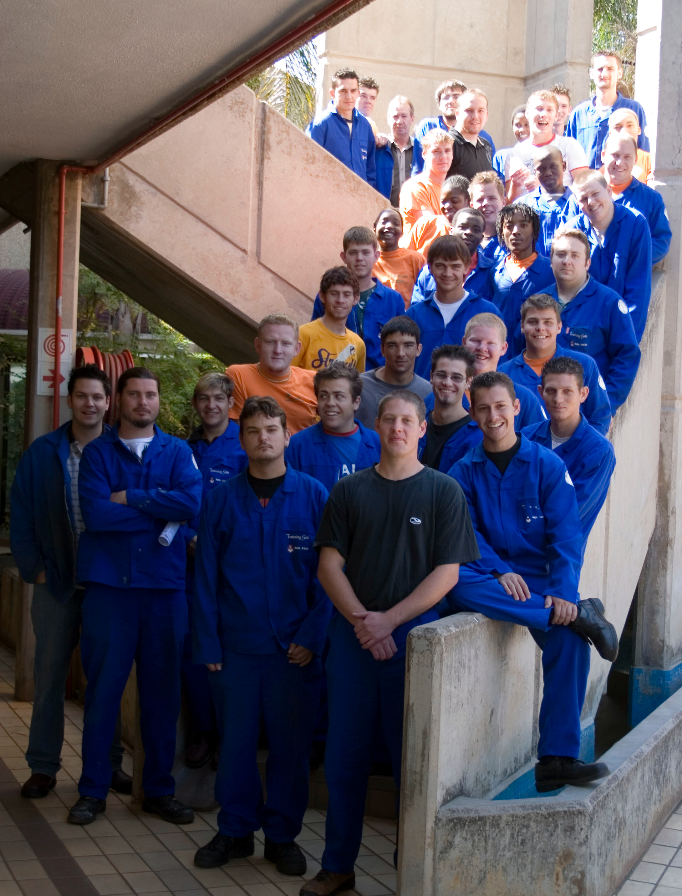 'n Paar van Sol-Tech se studente op die trappe voor die kampusgebou in Kloofsig, Centurion.